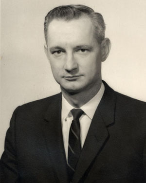 Donald Gilbert Sanders